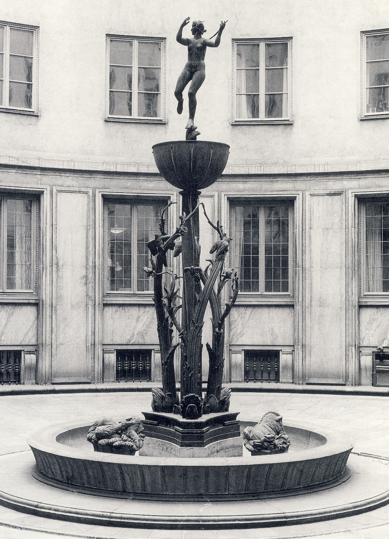 Carl Milles "Dianabrunnen I"